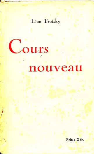 Trotsky - Cours nouveau (Boris Souvarine, 1924)